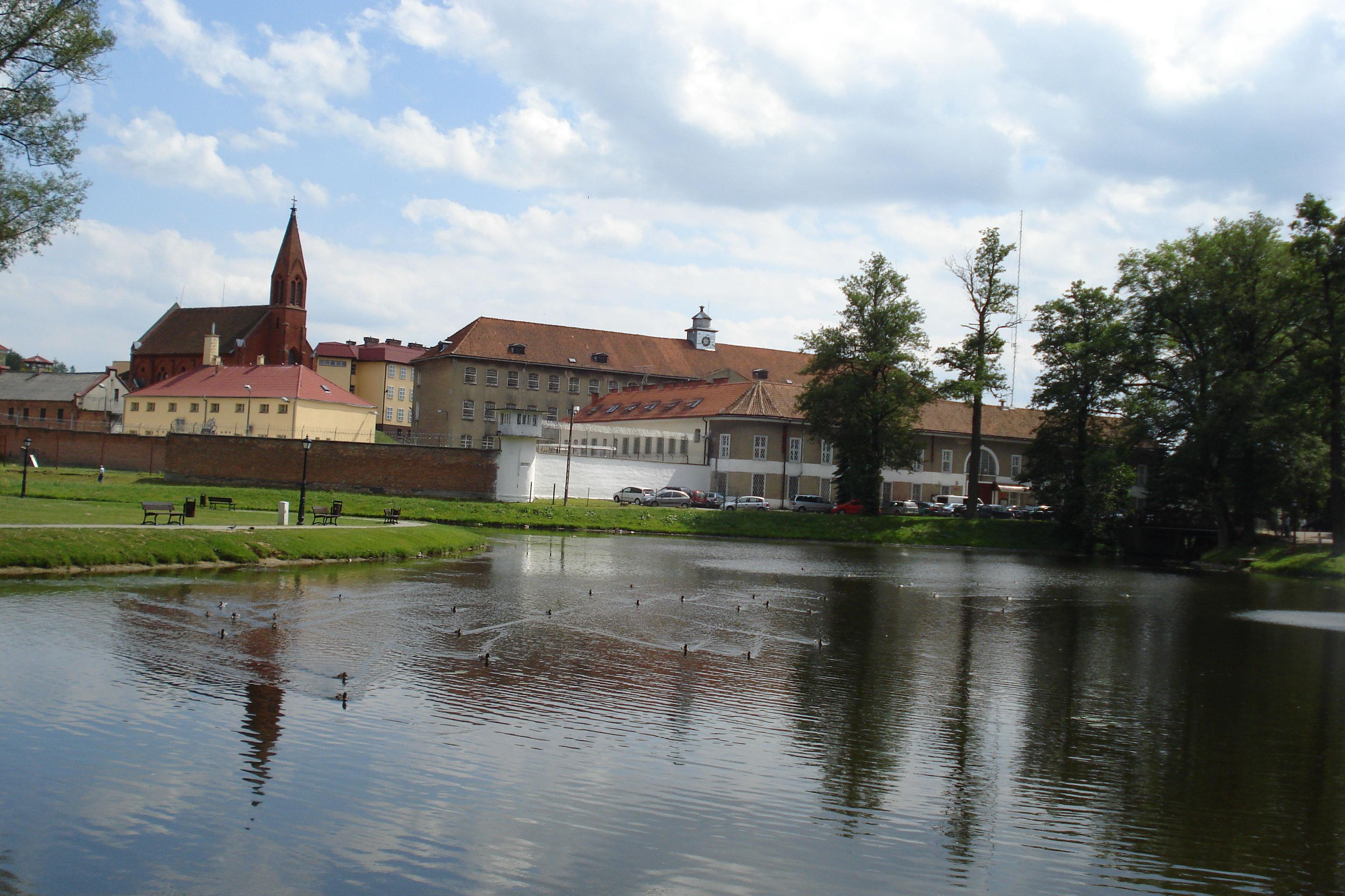 Zakład Karny w BARCZEWIE